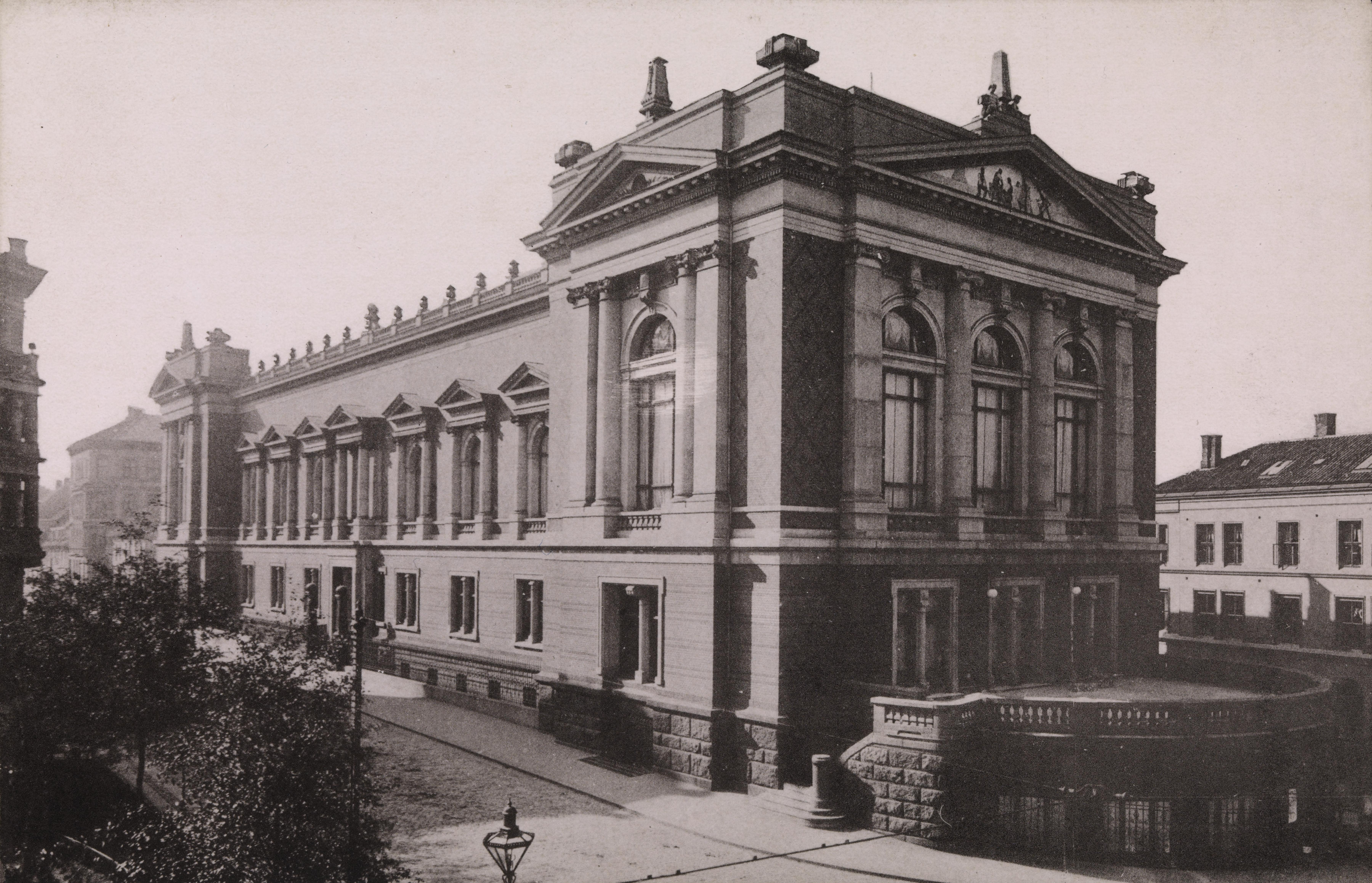 Bildet er hentet fra Nasjonalbibliotekets bildesamling Nedre Vollgate 19, Oslo, Oslo